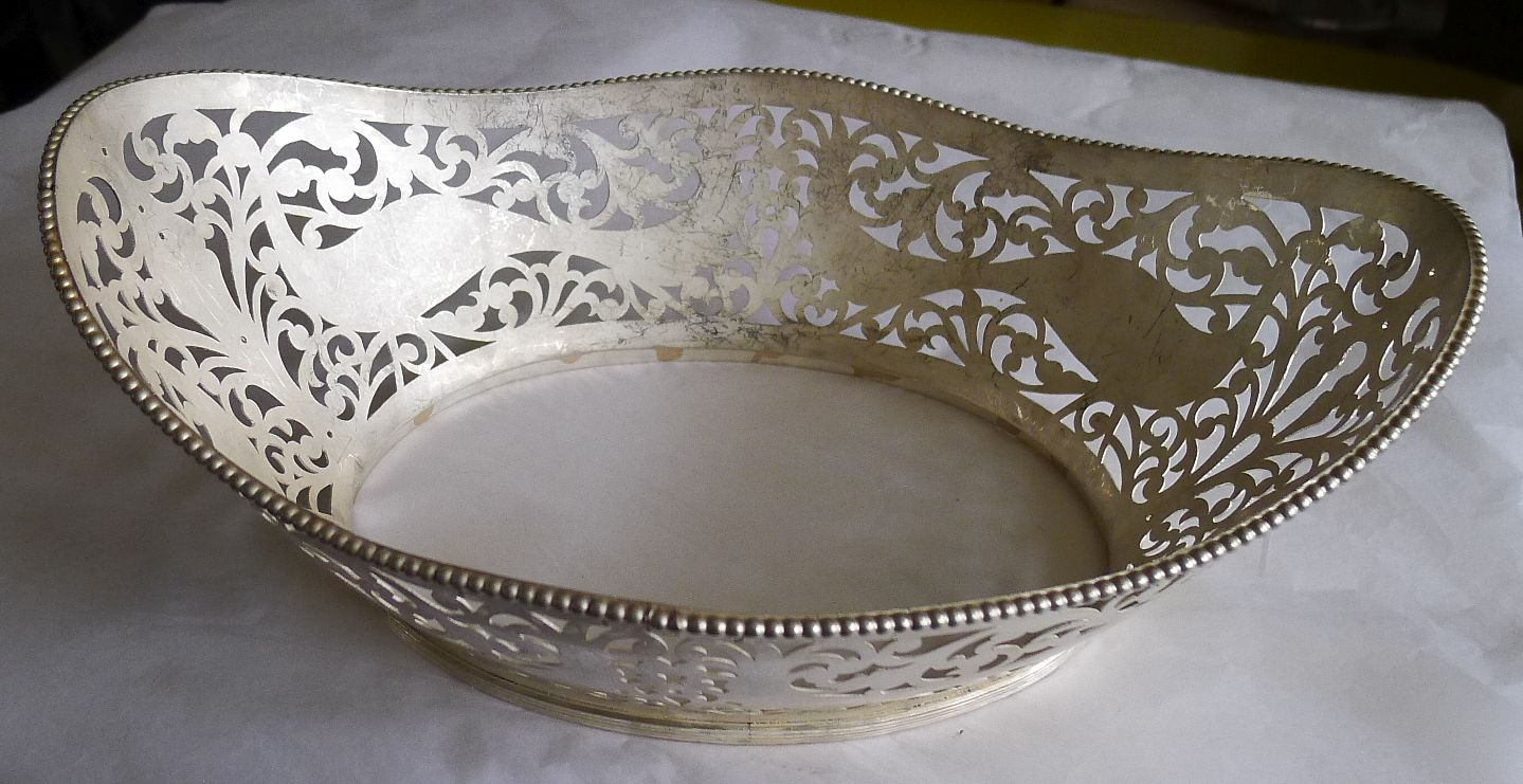 Zilveren schaal bijna geheel uitgezaagd en in vorm gebracht (Bert Looren de Jong, Schoonhoven)